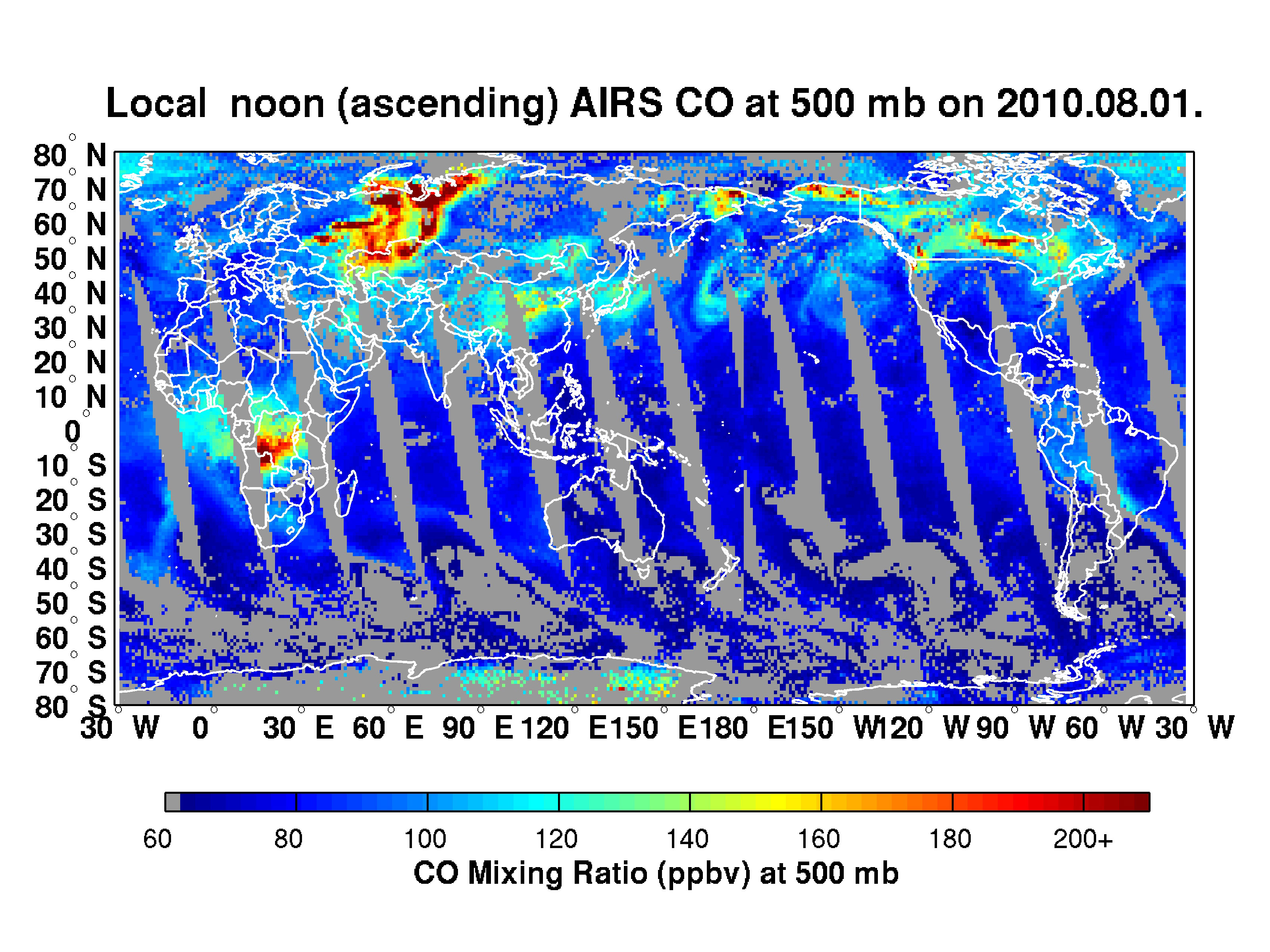 Concentration du monoxyde de carbone dans l'air à 5500m d'altitude le 1er août 2010. Au niveau de la Russie, en raison des incendies, une grande zone est couverte.